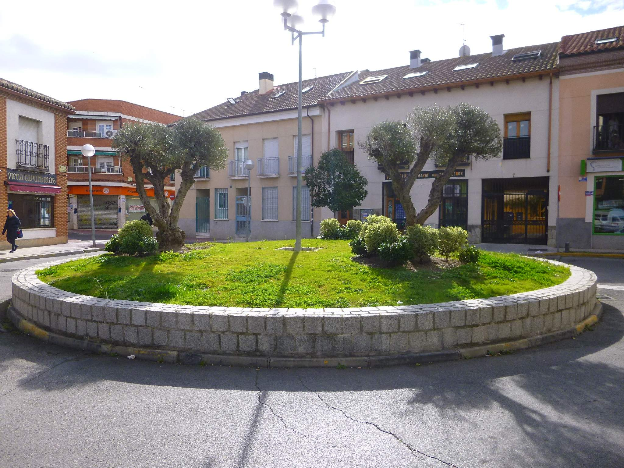 Pinto (Madrid)